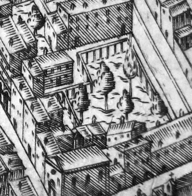 Pianta del buonsignori, dettaglio, giardino di san marco